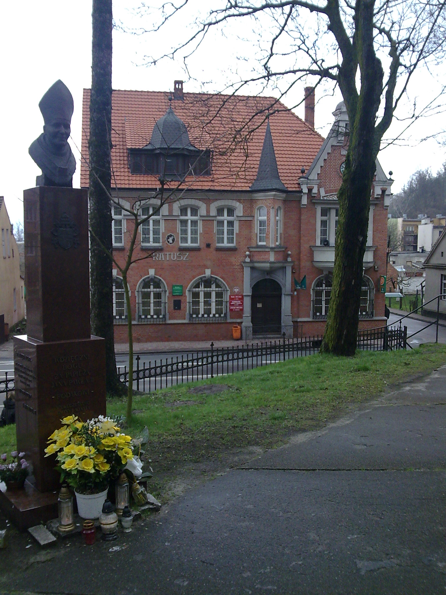 Budynek miejskiego ratusza w Ujściu